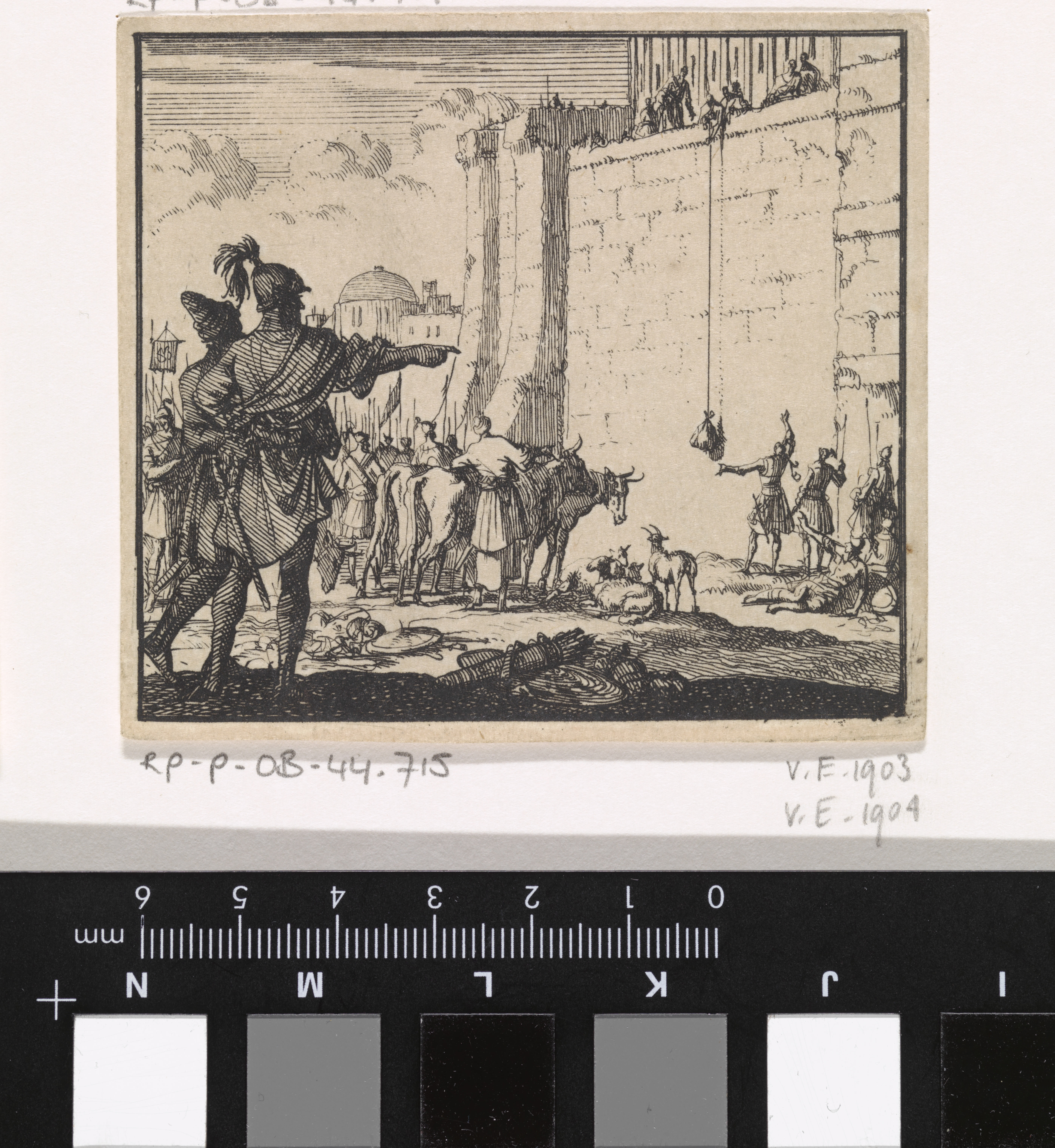 IdentificatieTitel(s): De in de tempel opgesloten Joodse priesters trachten zich voor het paasfeest van offerdieren te voorzienObjecttype: prent Objectnummer: RP-P-OB-44.715Catalogusreferentie: Van Eeghen 1904-1(2)Opschriften / Merken: verzamelaarsmerk, verso, gestempeld: Lugt 2228VervaardigingVervaardiger: prentmaker: Jan LuykenPlaats vervaardiging: AmsterdamDatering: 1698Fysieke kenmerken: ets; proefdrukMateriaal: papier Techniek: etsenAfmetingen: blad: h 76 mm × b 84 mmToelichtingProefdruk van illustratie uit: Josephus, Flavius. XX. boeken van de oude geschiedenissen der joden, 4 delen. Amsterdam: Barent Visscher, Willem de Coup, Willem van Lamsveld, Andries van Damme, 1698, dl. II.OnderwerpWat: fourth book of the Maccabees (4 Maccabees)Verwerving en rechtenVerwerving: onbekendCopyright: Publiek domein